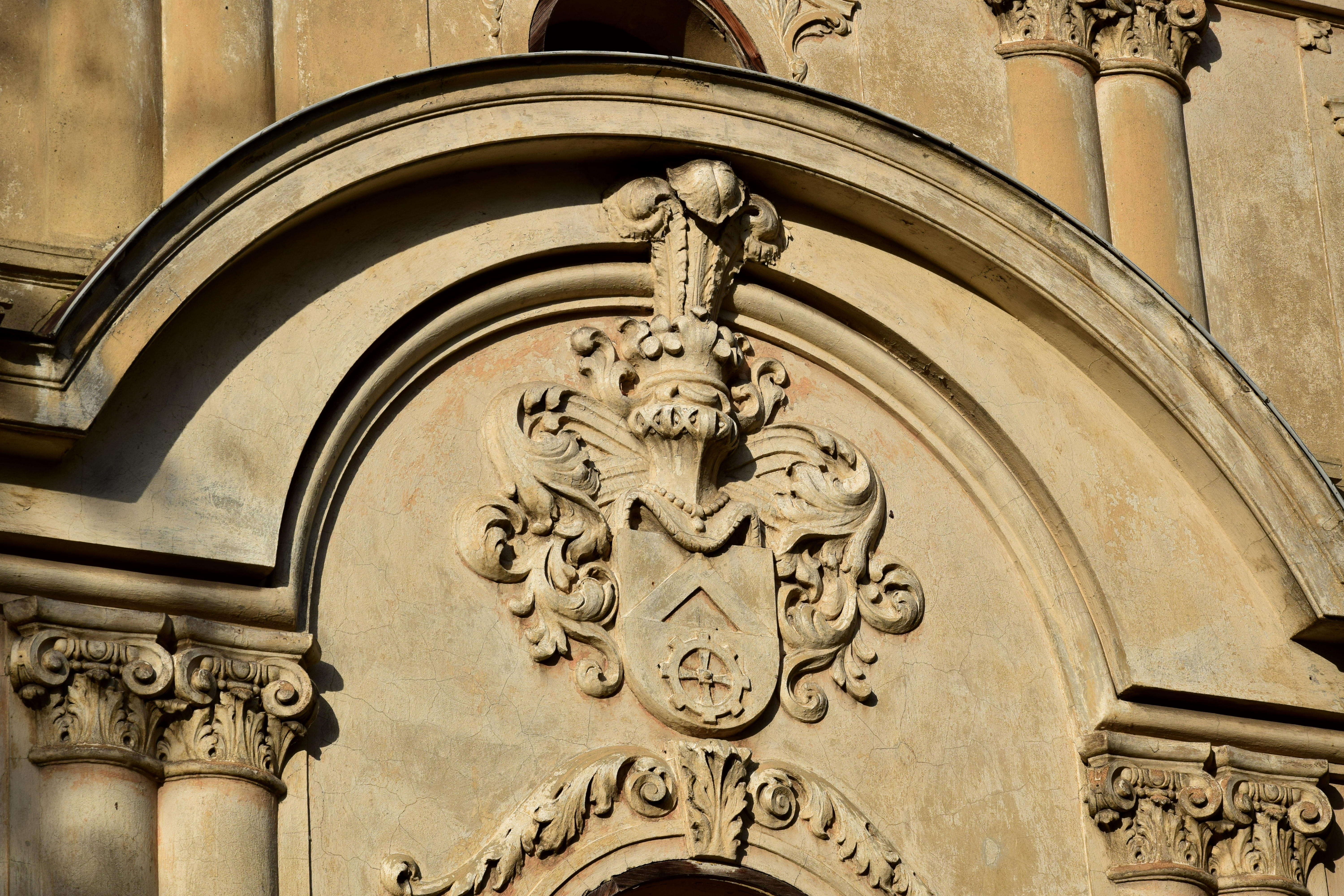 Zámek Poláky – erb na jižním průčelí